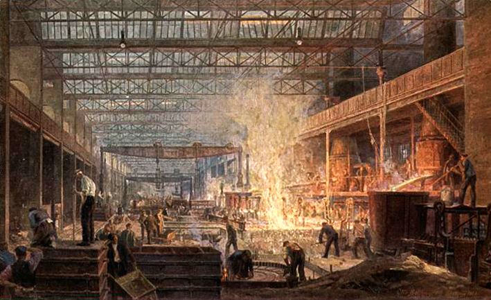 Fried. Krupp AG Grusonwerk, Panzergießerei